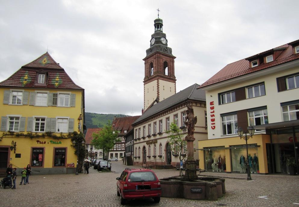 Haslach Markt